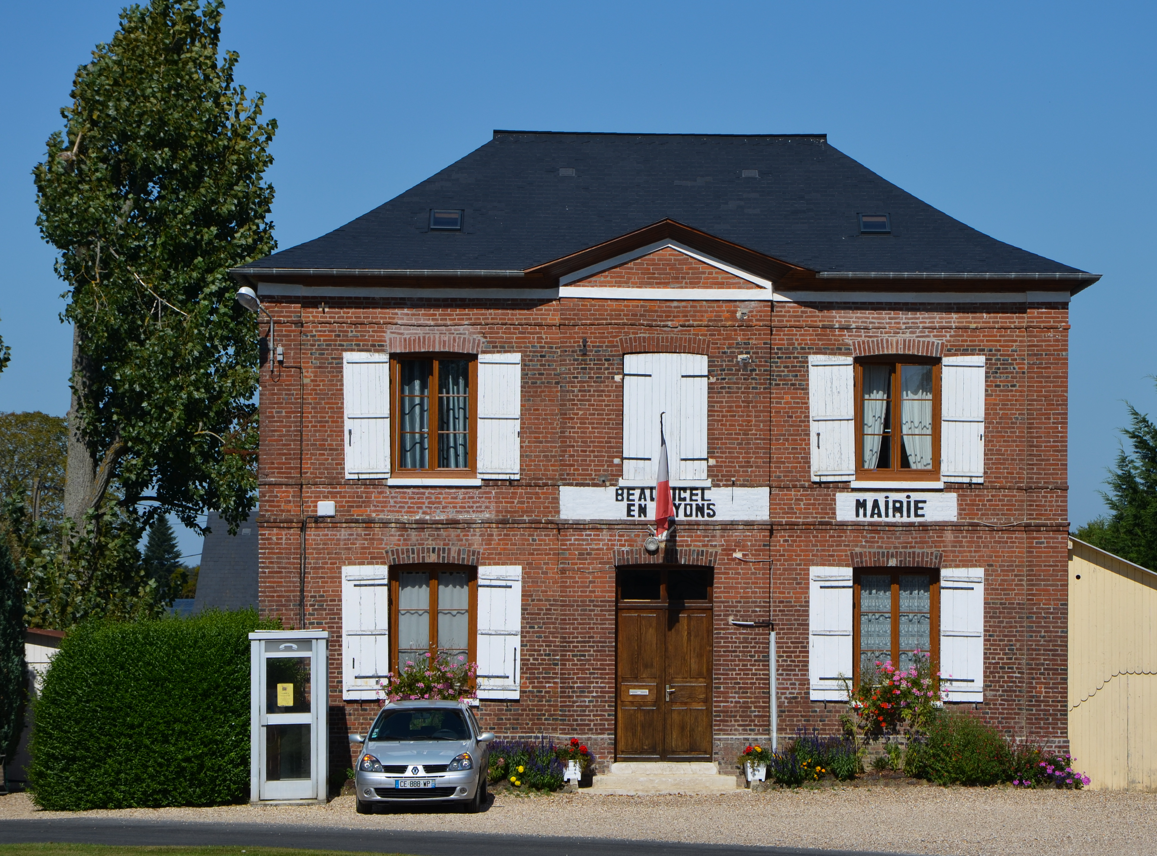 Mairie de Beauficel-en-Lyons, Eure, Normandie, France